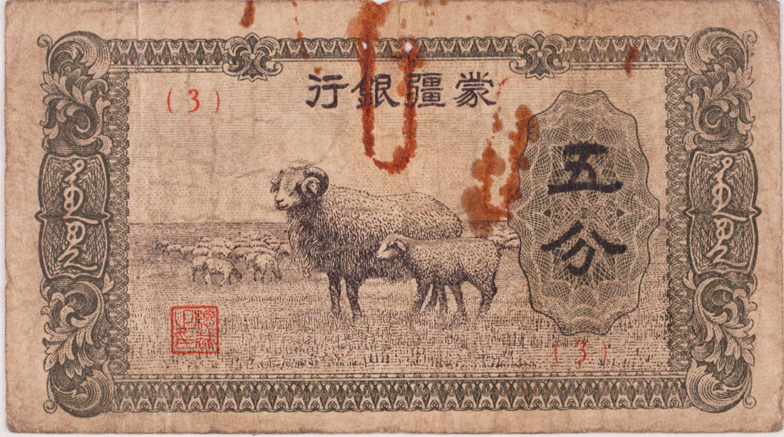 Banknote 5 sen, Mengjiang-Bank (蒙疆銀行 China), pre 1938 (rev)